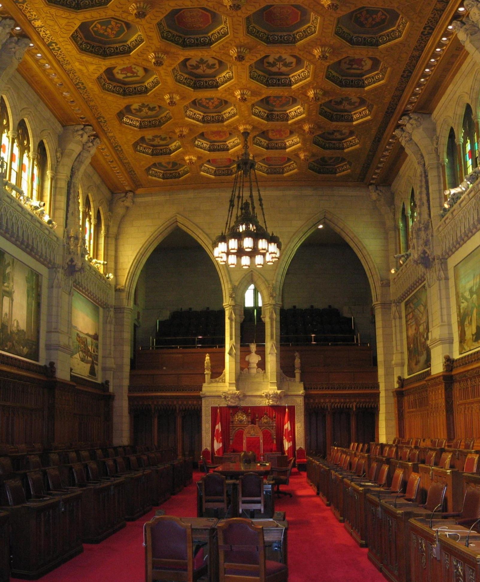 Chambre du Sénat, édifice du Centre du Parlement du Canada - Senate Chamber, Centre Block of the Parliament of Canada